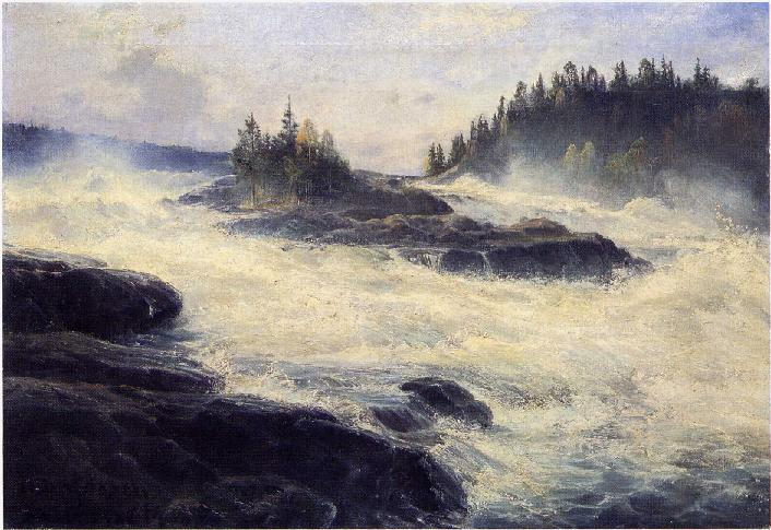 i Ångermanälven